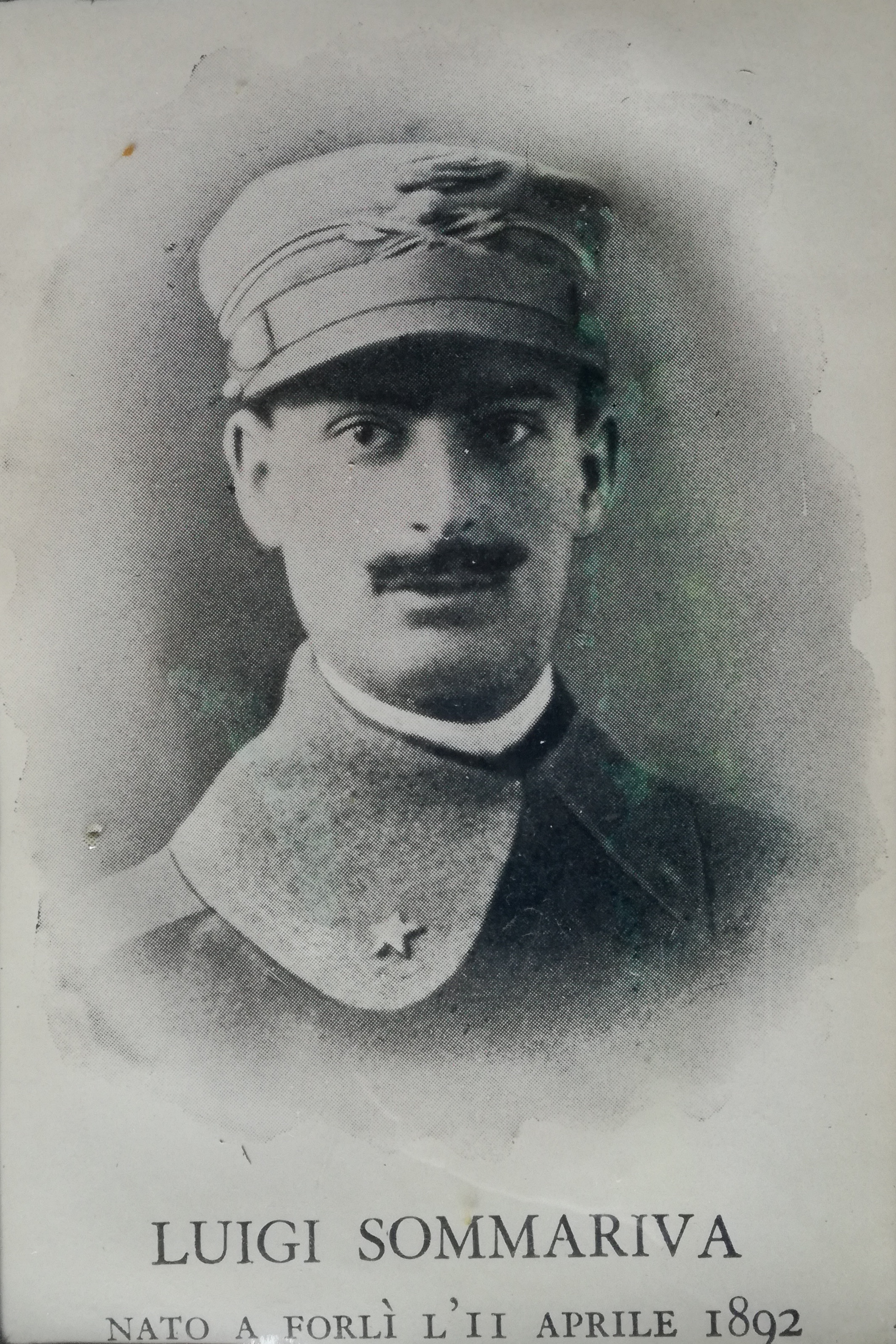 Luigi Sommariva in una foto d'epoca